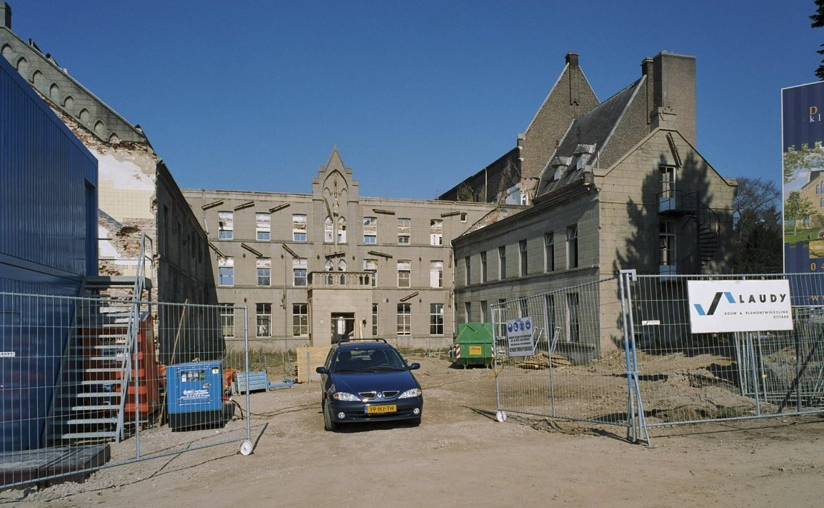 Klooster Overbunde: Overzicht hoofdingang